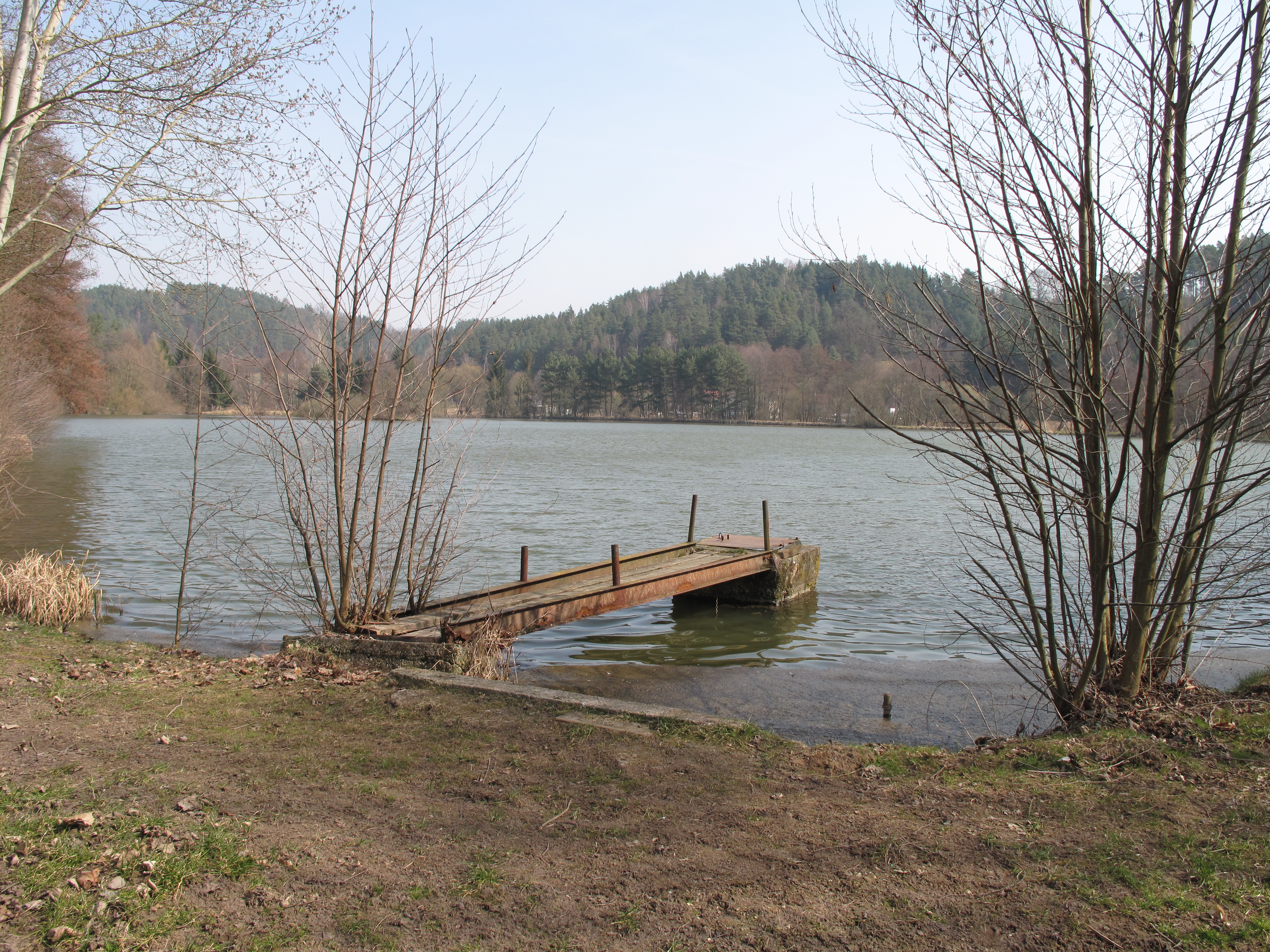 Rybník v Borovici. Okres Mladá Boleslav, Česká republika.